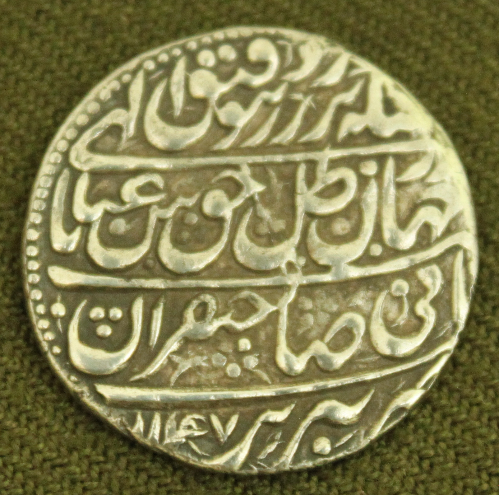 Сефевиды Шах Аббас III серебряная монета 1734 год.